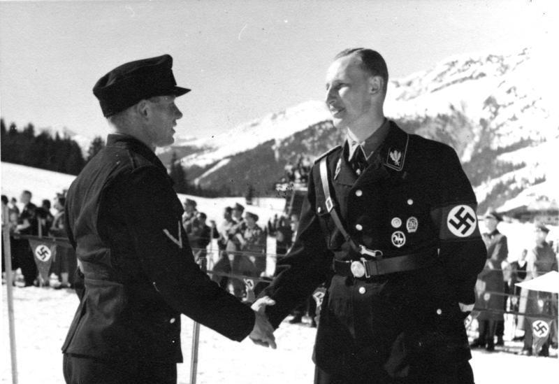 Skimeisterschaften Kitzbühel 1939 Am Ziel